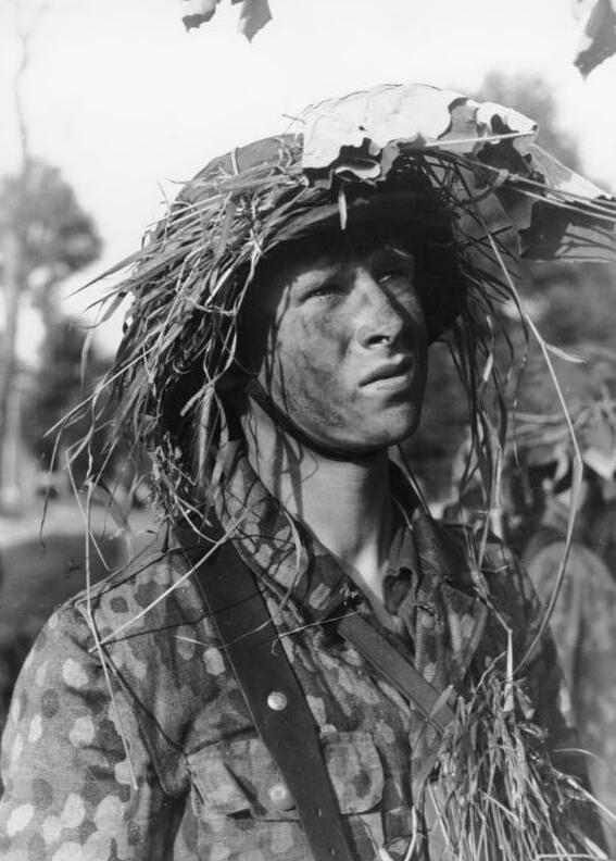 Invasionsfront Das Gesicht des Grenadiers der Panzerdivision "Hitler-Jugend" an der normannischen Invasionsfront. Foto: SS-Kriegsberichter Zschäkel